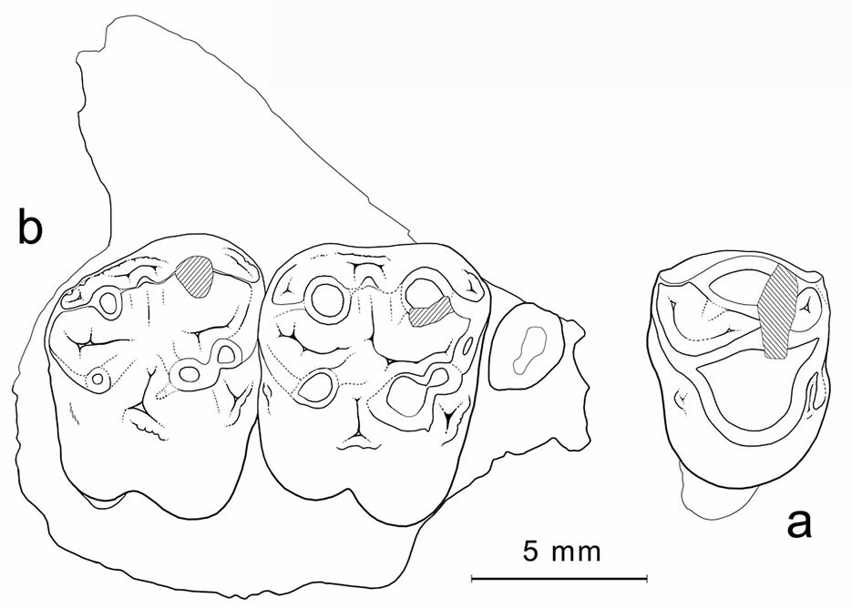 Cebochoerus aff. fontensis. a : MHNG GEPI V5591, M2/-M3/ droites (vue occlusale). b : MHNG GEPI V5586, P4/ gauche (inversée) (vue occlusale).